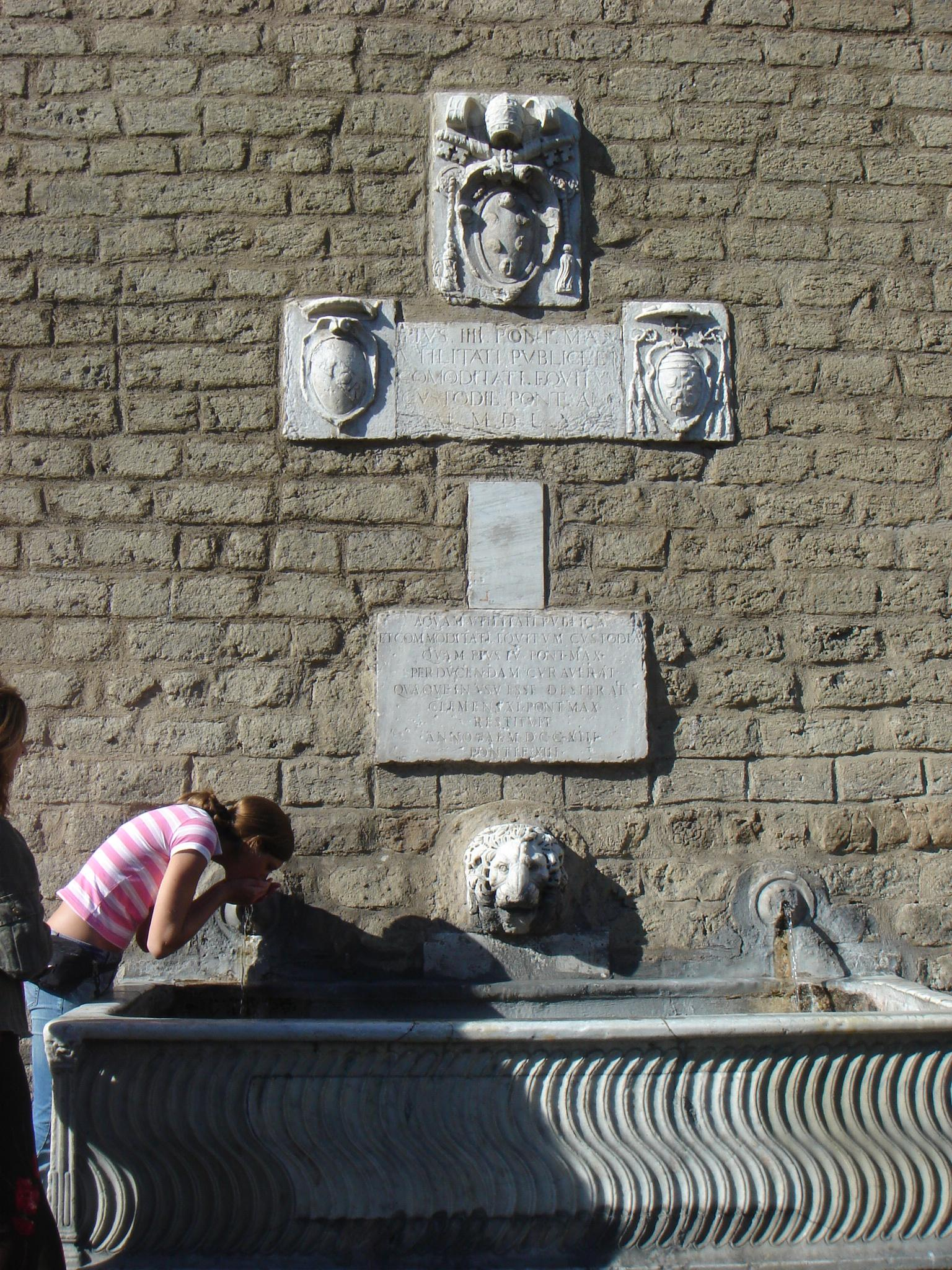 Roma, San Pietro: fontana dei Cavalleggeri a porta Cavalleggeri